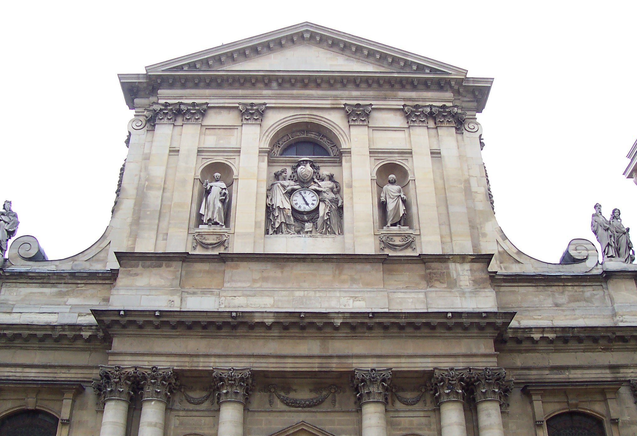 La Sorbonne, Paris, France